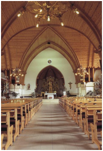 Interier kostola sv. Anny